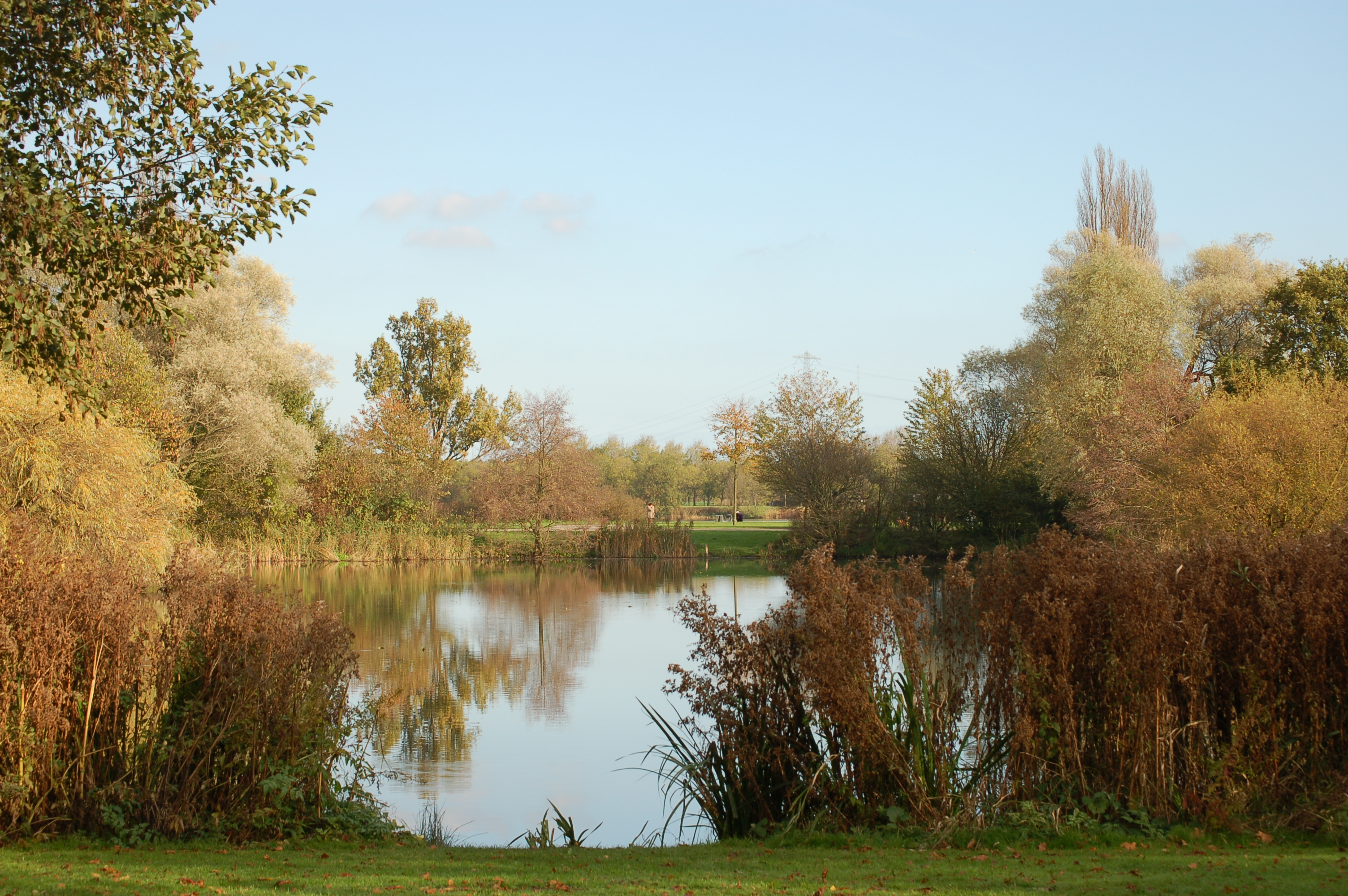 Le parc Flevo à Amsterdam